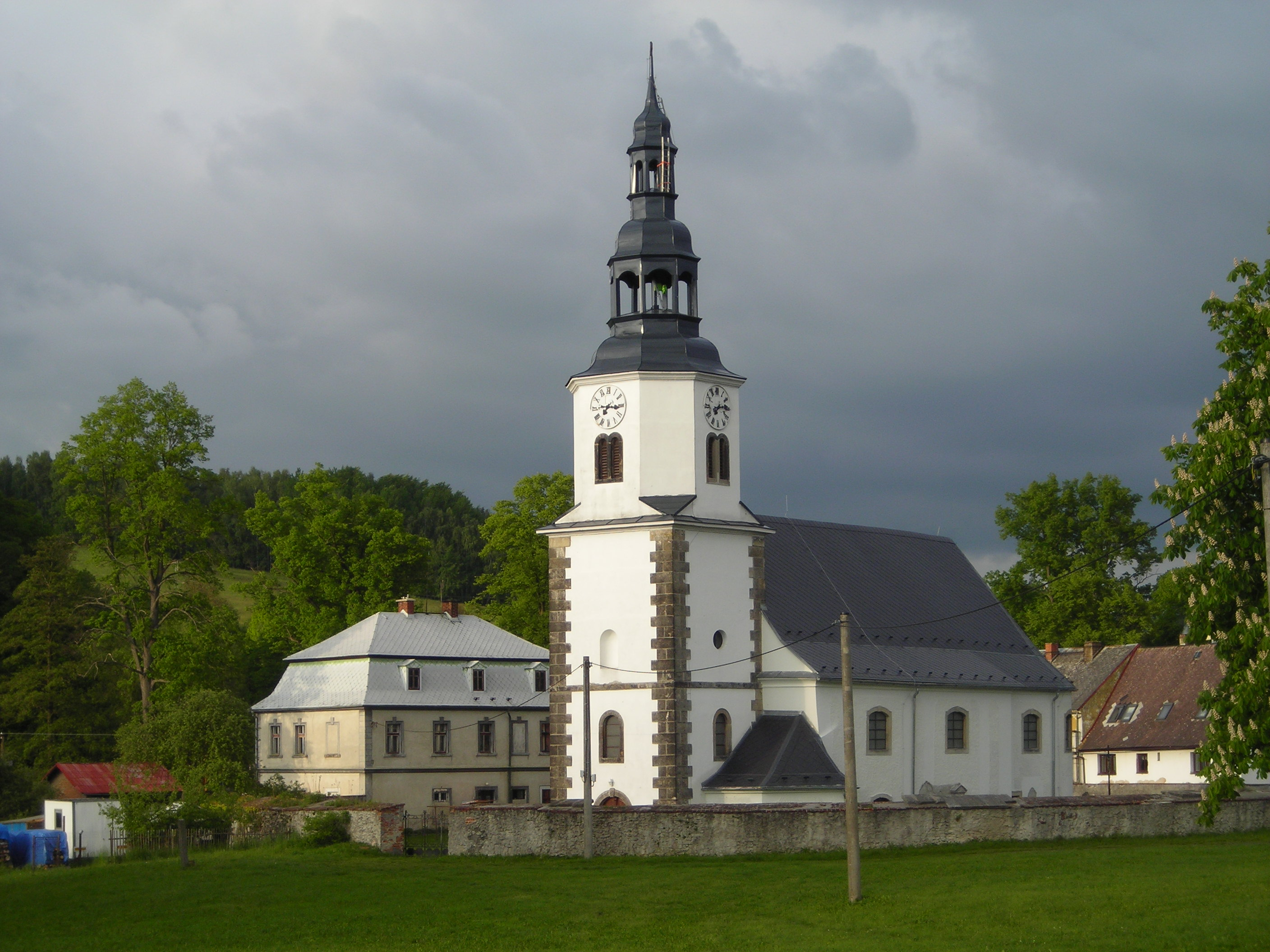 Kostel sv. Mikuláše v obci Bílý Kostel nad Nisou (s farou).